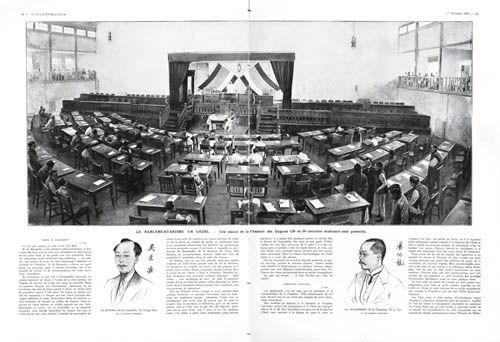 1913年2月1日，法国《插图画报》(即《巴黎竞赛画报》前身)上刊登的中华民国成立之初的参议院图片